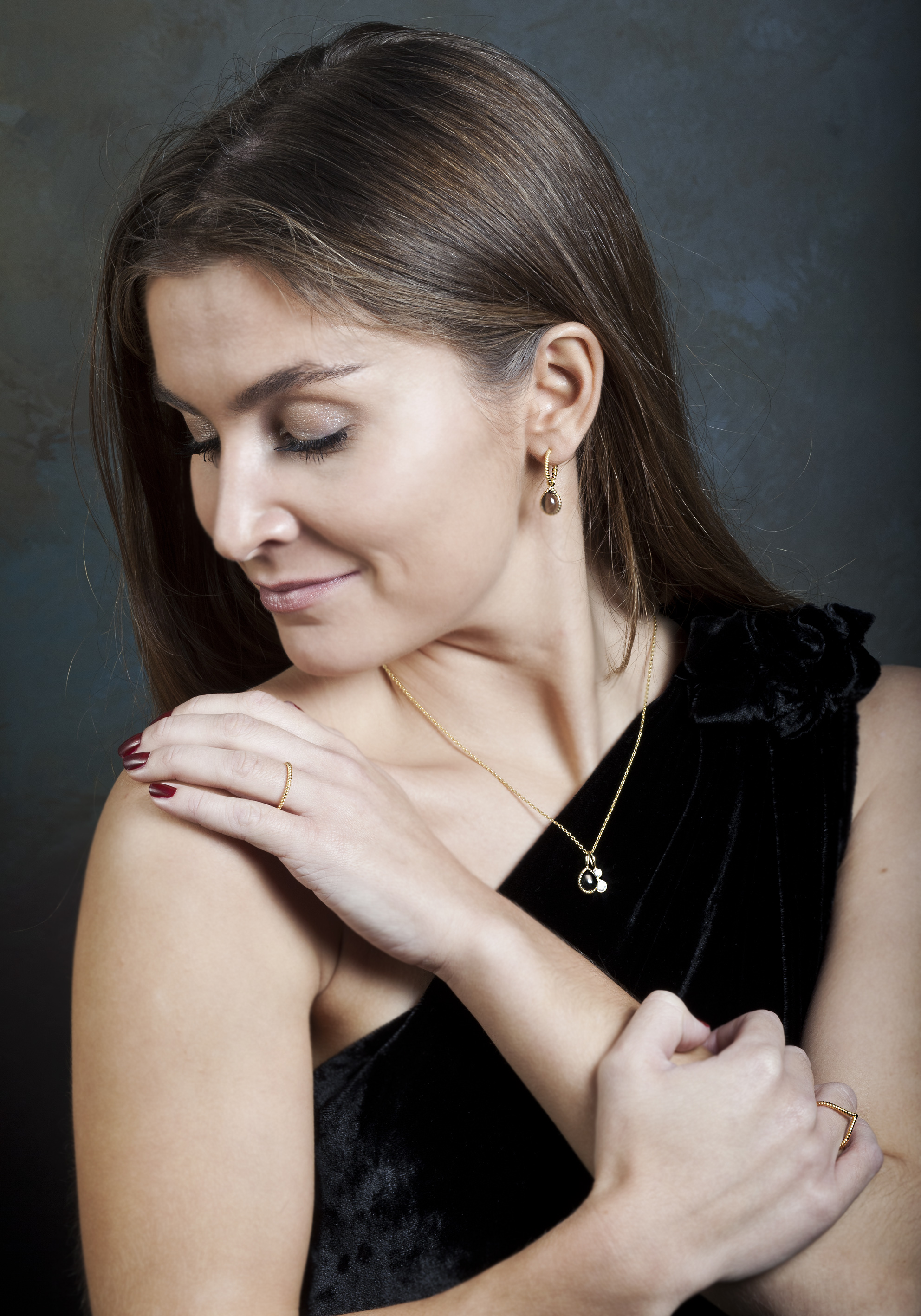 Model photo